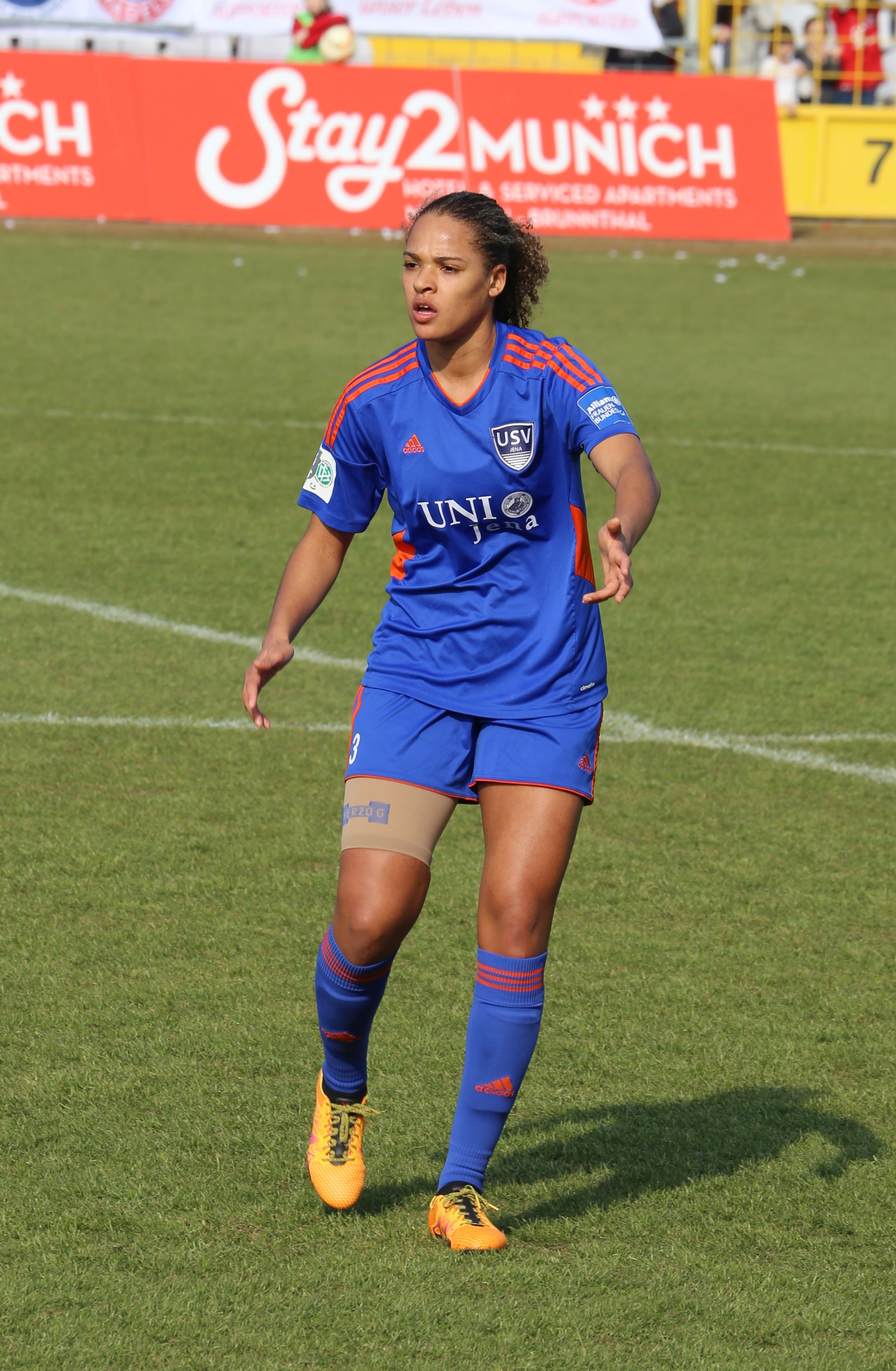 Rachel Melhado (FF USV Jena) beim Frauen-Bundesliga-Spiel FC Bayern München gegen FF USV Jena am 19. März 2016 im Stadion an der Grünwalder Straße (Ergebnis war 5:1).